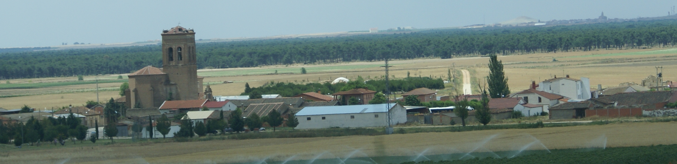 Vista de Bocigas, Valladolid